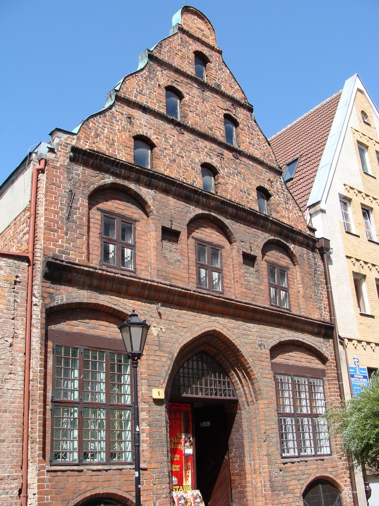 Kamienica mieszczańska przy ul. E. Gierczak w Kołobrzegu. Pochodząca z XV w. kamienica bogatej kołobrzeskiej szlacheckiej rodziny (wg niektórych źródeł – Schlieffenów). Zniszczona w czasie II wojny światowej. Odbudowana.